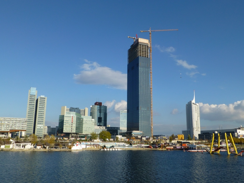 Donau City, Wien